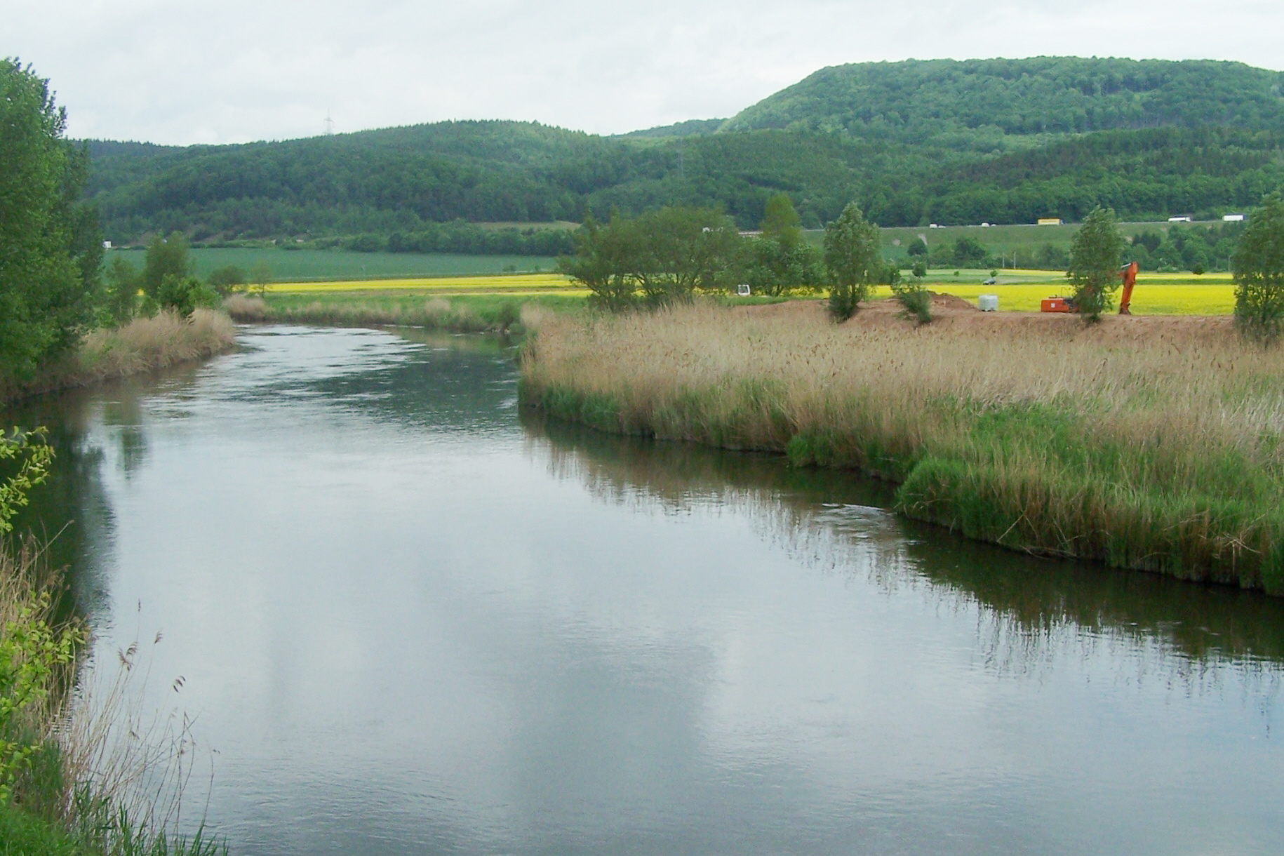 Blick auf die laufende Baumaßnahme (im Frühsommer 2008)